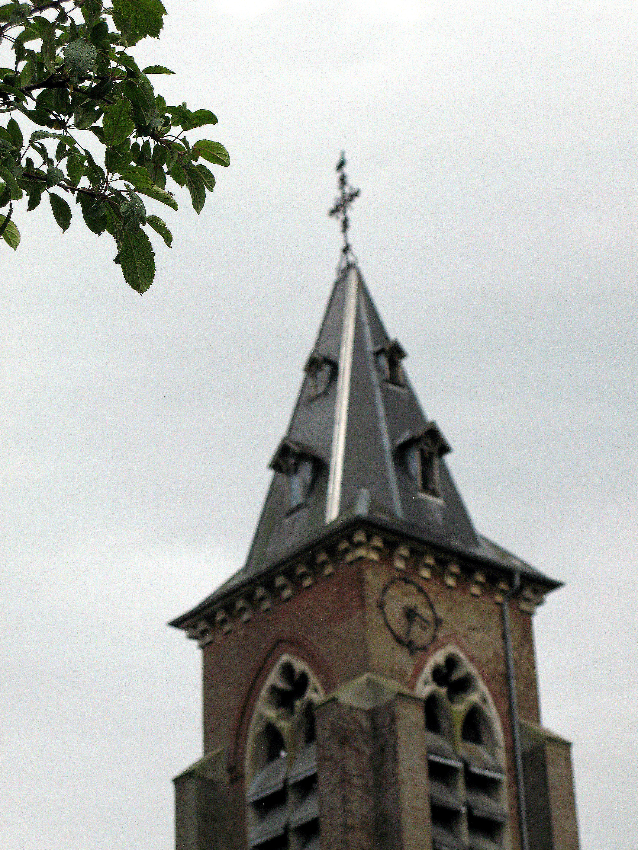 Abbeville (Somme, France) - Eglise St-Jean-Baptiste, dans le quartier de Rouvroy (à l'Ouest d'Abbeville). .